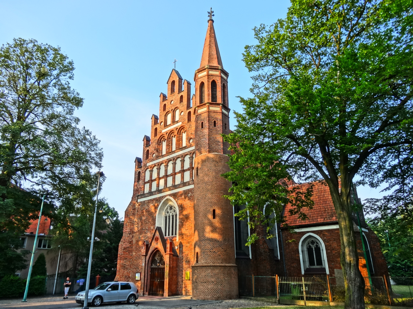 Kościół pobernardyński p.w. Najświętszej Maryi Panny Królowej Pokoju, zbud. 1552-1557, do 1830 kościół klasztorny bernardynów bydgoskich, od 1866 r. garnizonowy